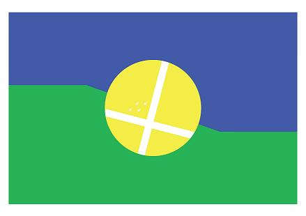 Enarbolada por primera vez el 19 de Octubre de 2012.